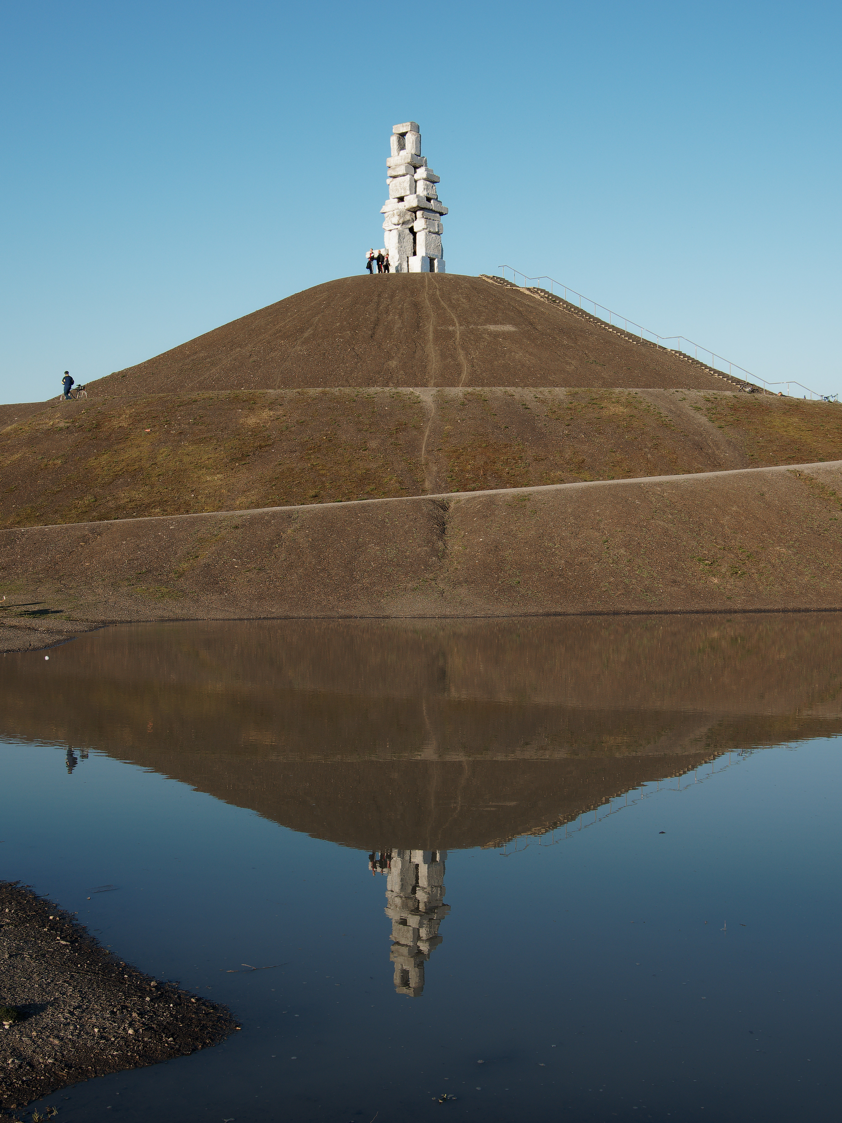 Himmelstreppe von Herman Prigann auf der Halde Rheinelbe Süd der ehemaligen Zeche Rheinelbe in Gelsenkirchen. Die Skulptur Himmelstreppe aus alten Betonteilen wurde von Unbekannten im März 2019 mit silbriger Farbe bespüht.